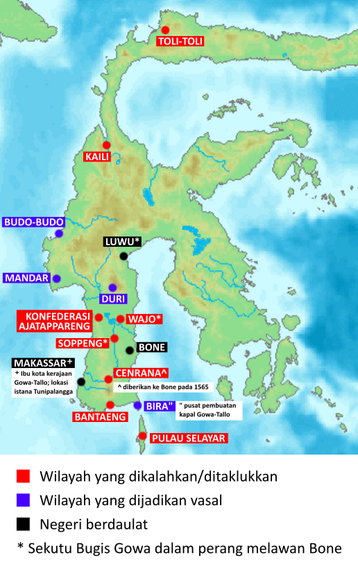 Penaklukan I Mariogau' I Daeng Bonto Karaeng Lakiung Tunipalangga (memerintah sekitar 1546-1565) dari Gowa.